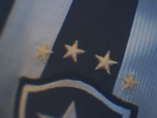 As antigas quatro estrelas amarelas na minha camisa do Botafogo de Futebol e Regatas, sobre o escudo do time.